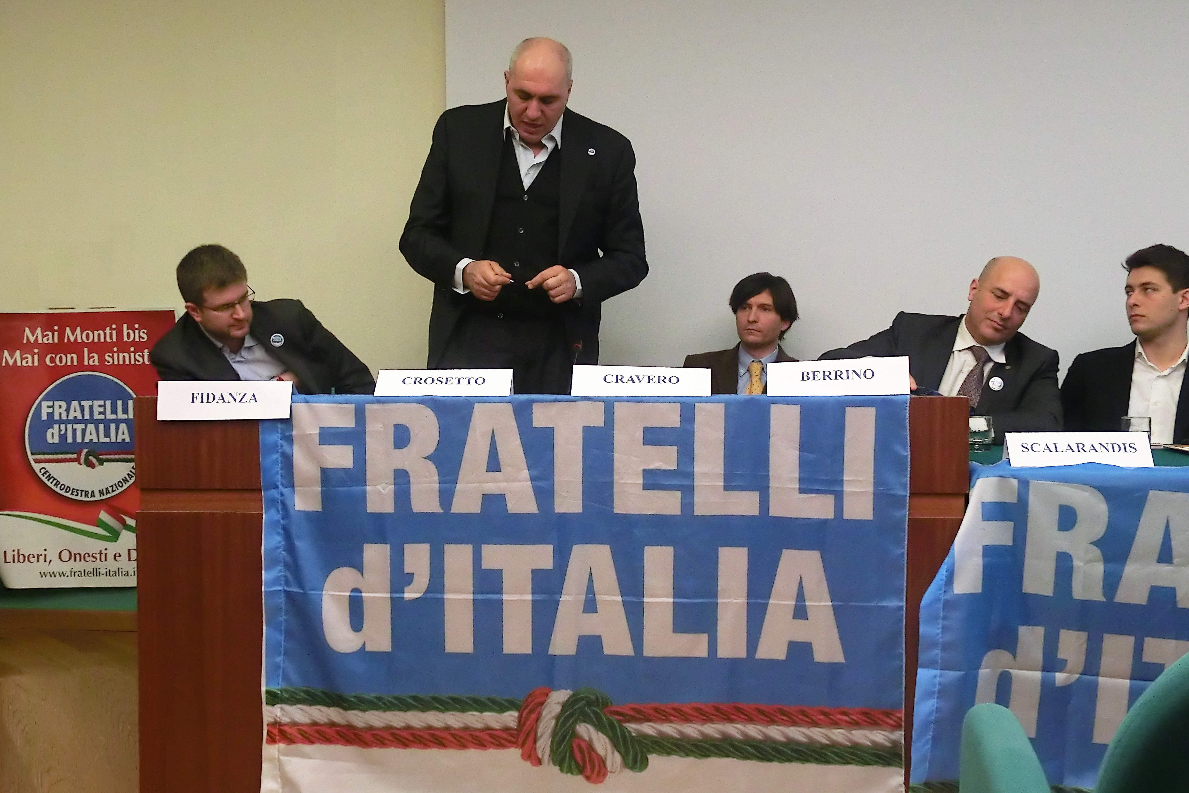 Guido Crosetto e Carlo Fidanza, comizio di Fratelli d'Italia